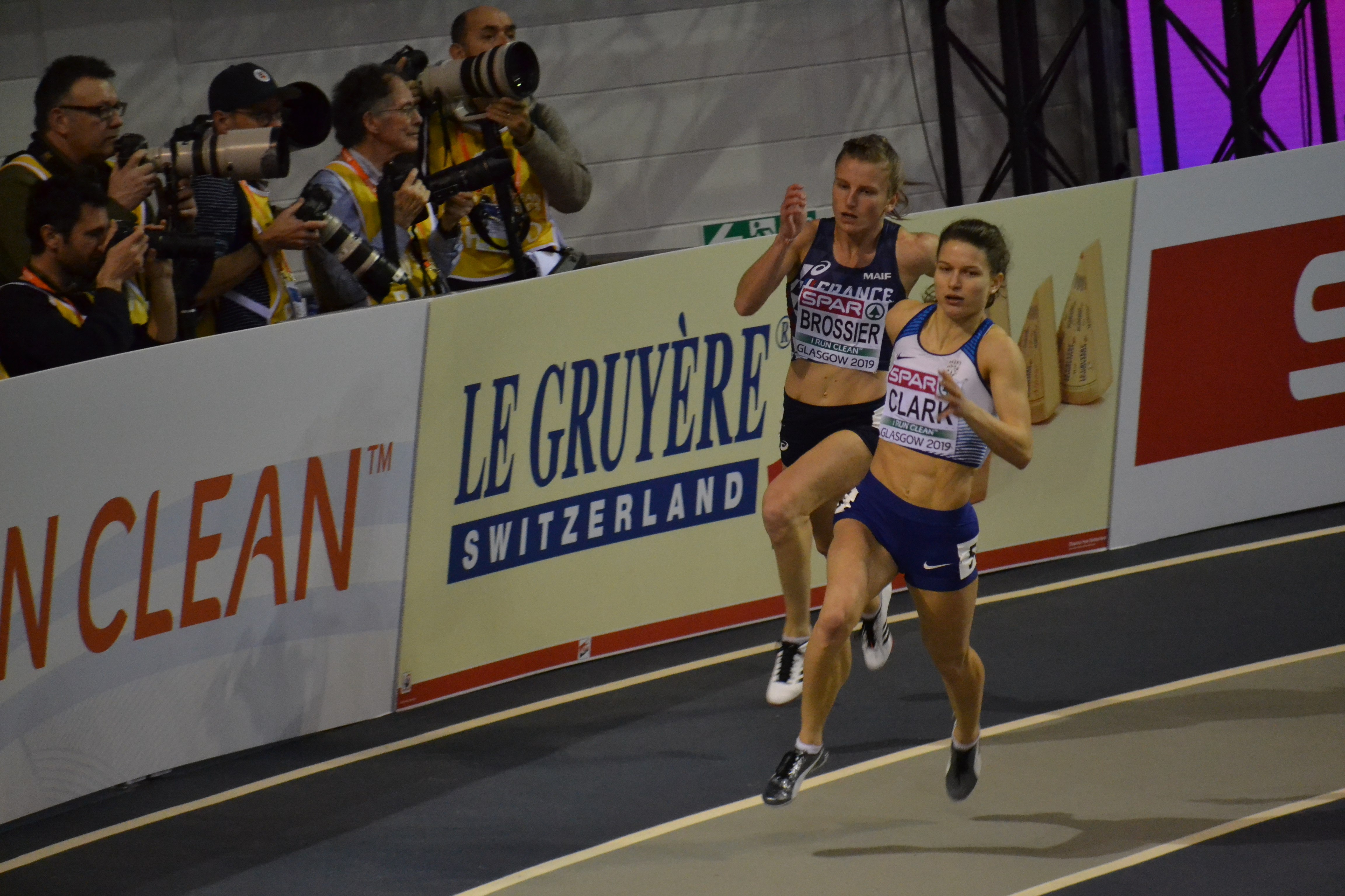 Womens 400m